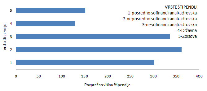 vir: surs